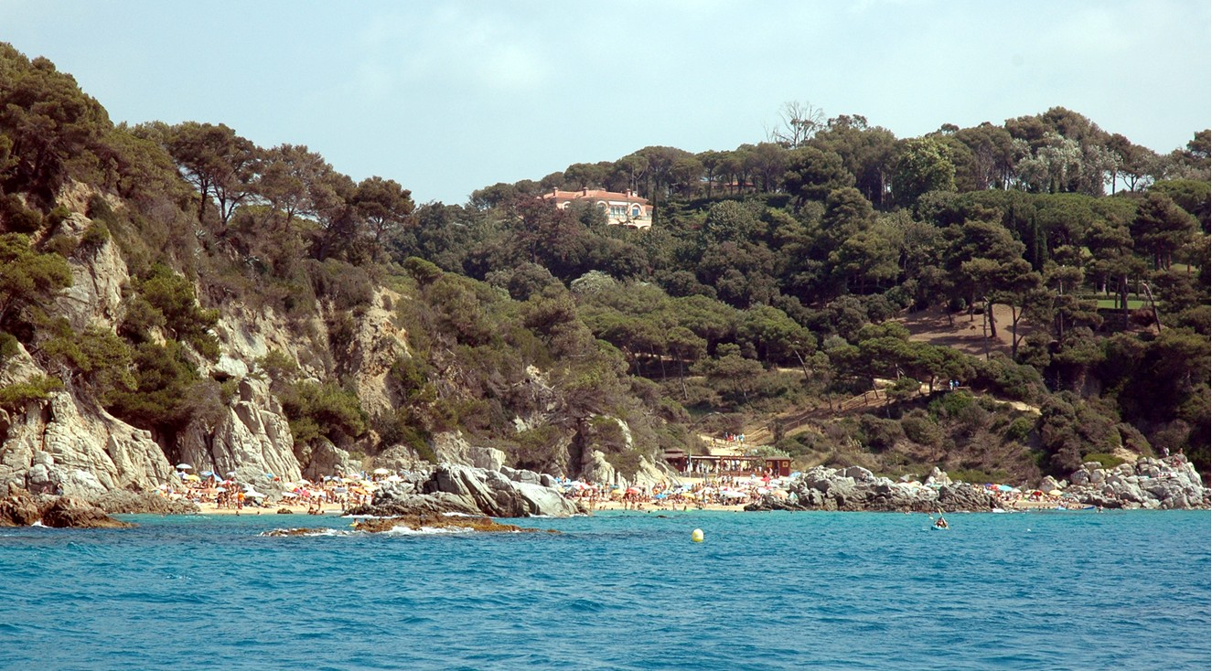 Cala Boadella, Lloret, Girona